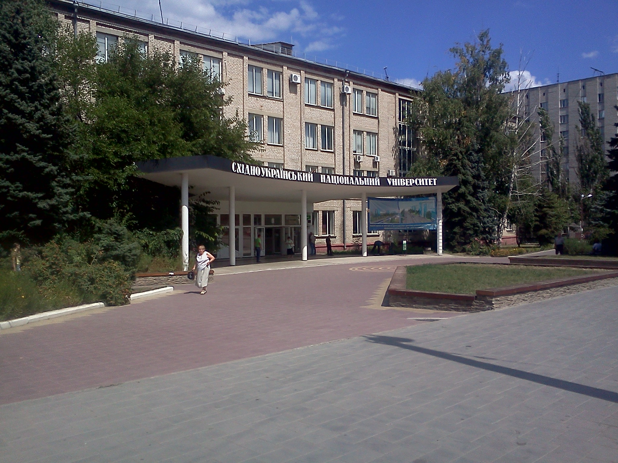 Первый, или главный административный корпус Восточноукраинского Национального Университета имени В.Даля